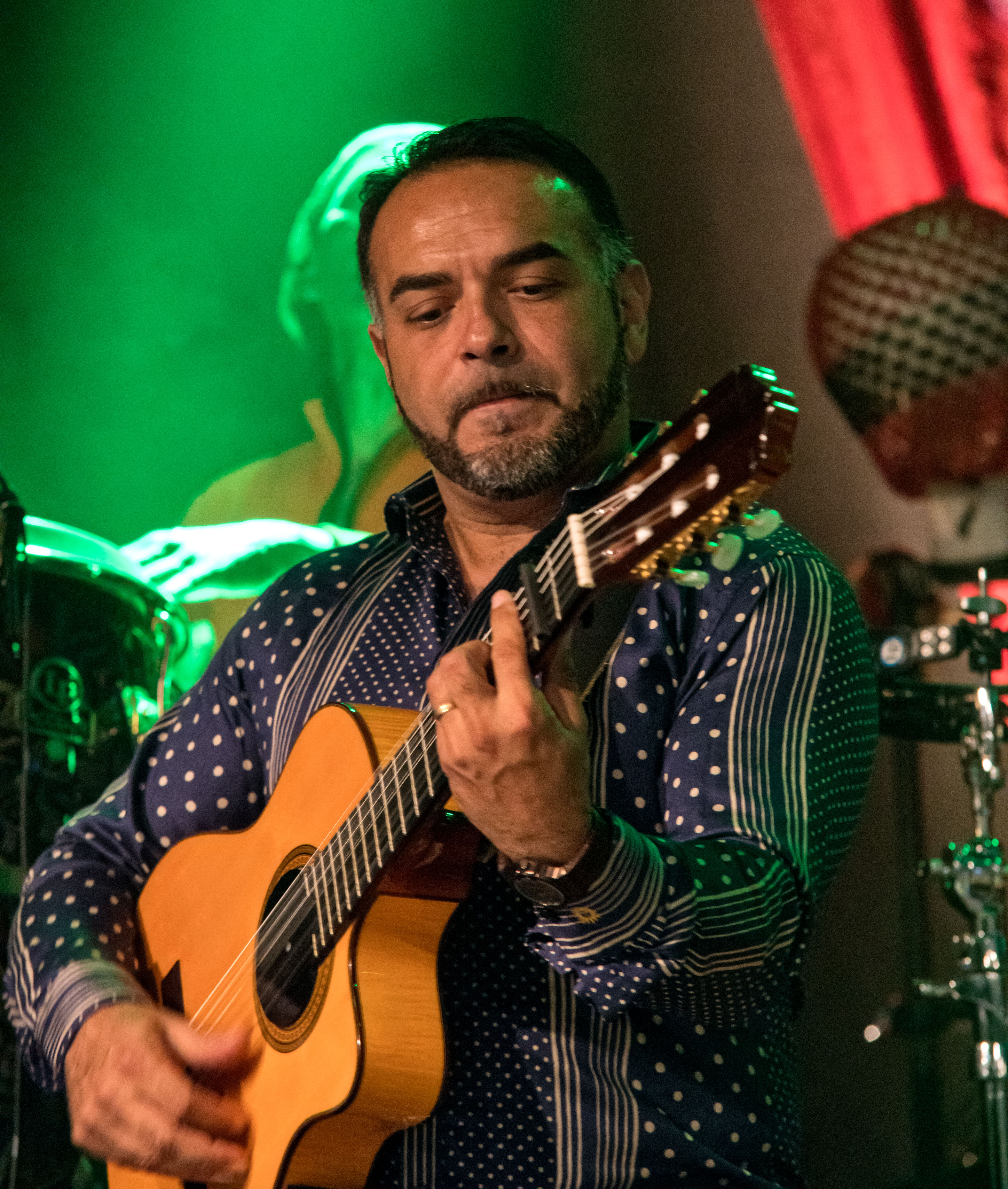 Bilder vom Zelt Musik Festival 2016 in Freiburg im Breisgau Gipsy Kings